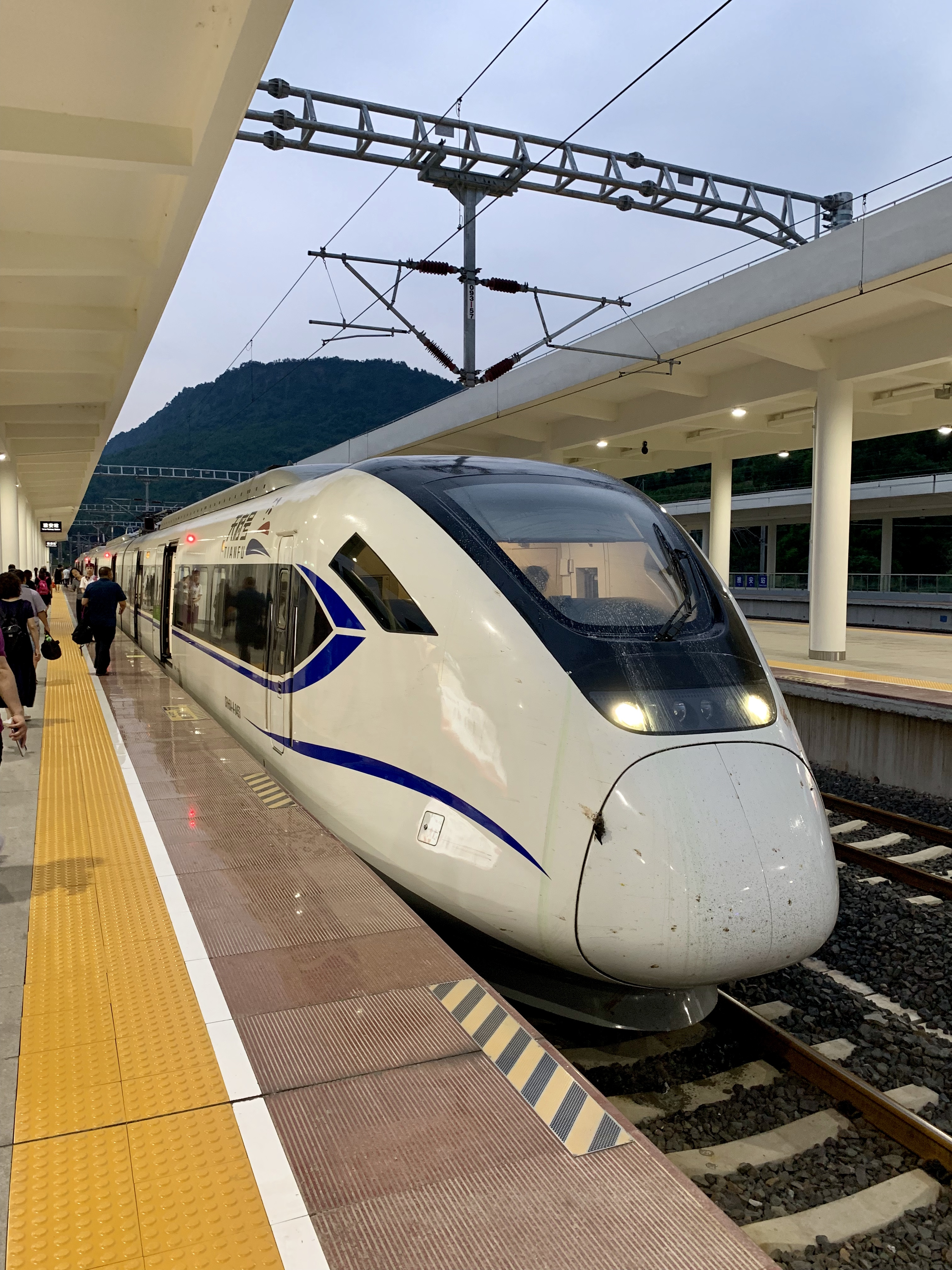 停靠在雅安站的成雅铁路“天府号”CRH6A-A四节编组市域动车组